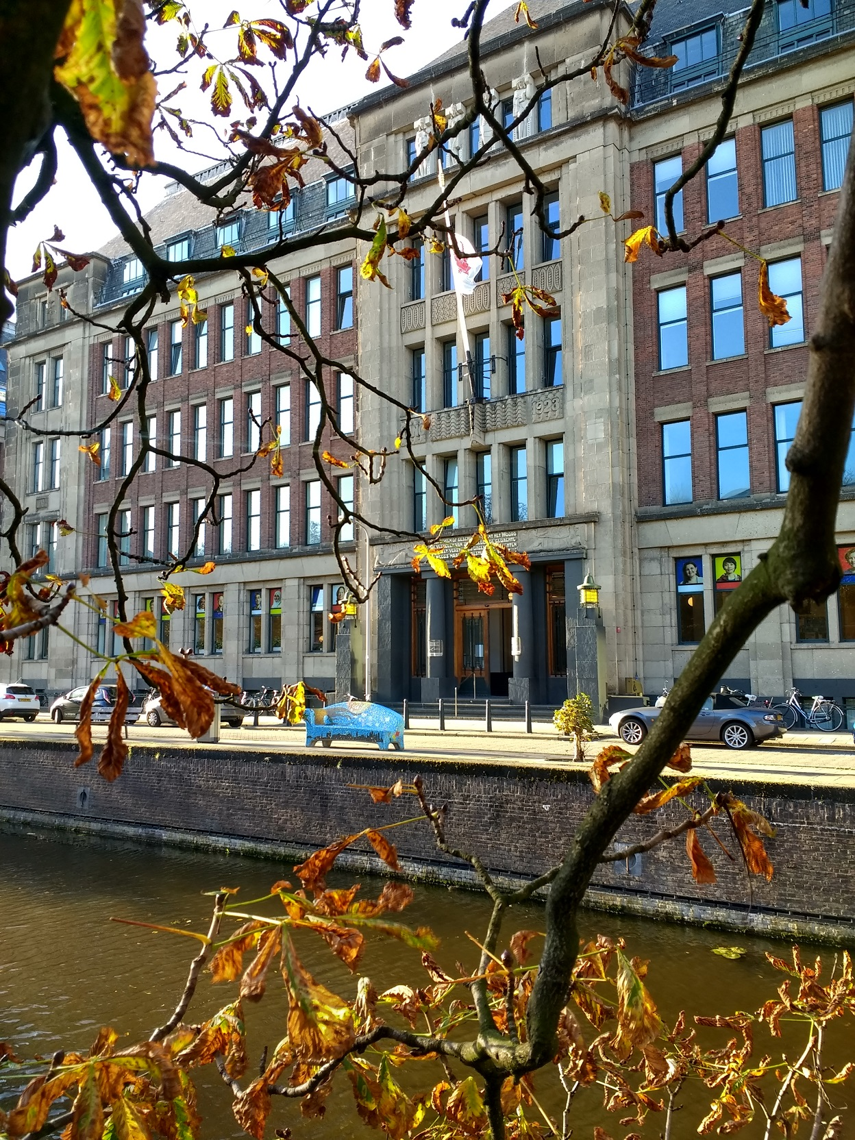 Social sofa Den Haag Kortenaerkade